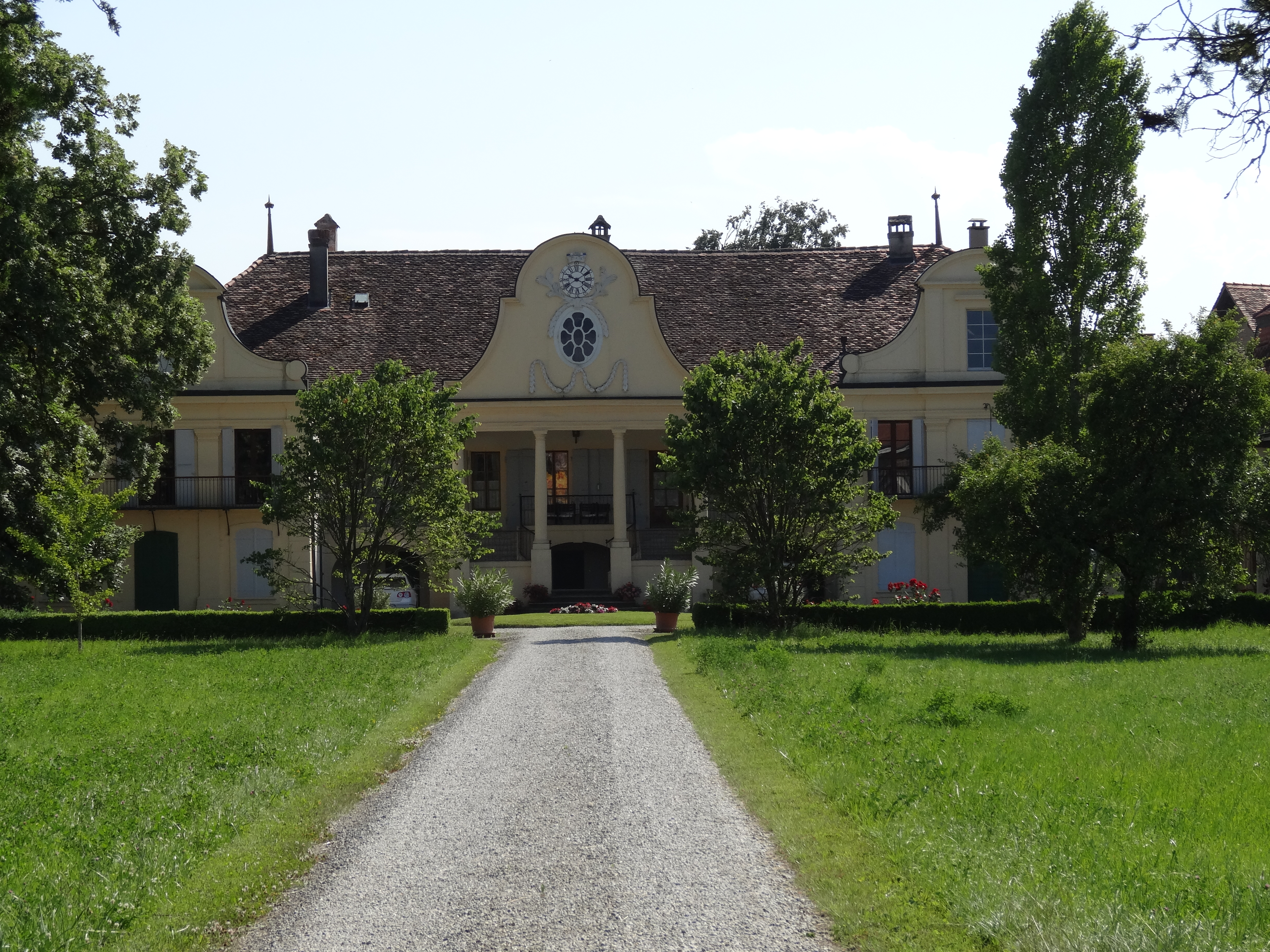 Mathod, Le château